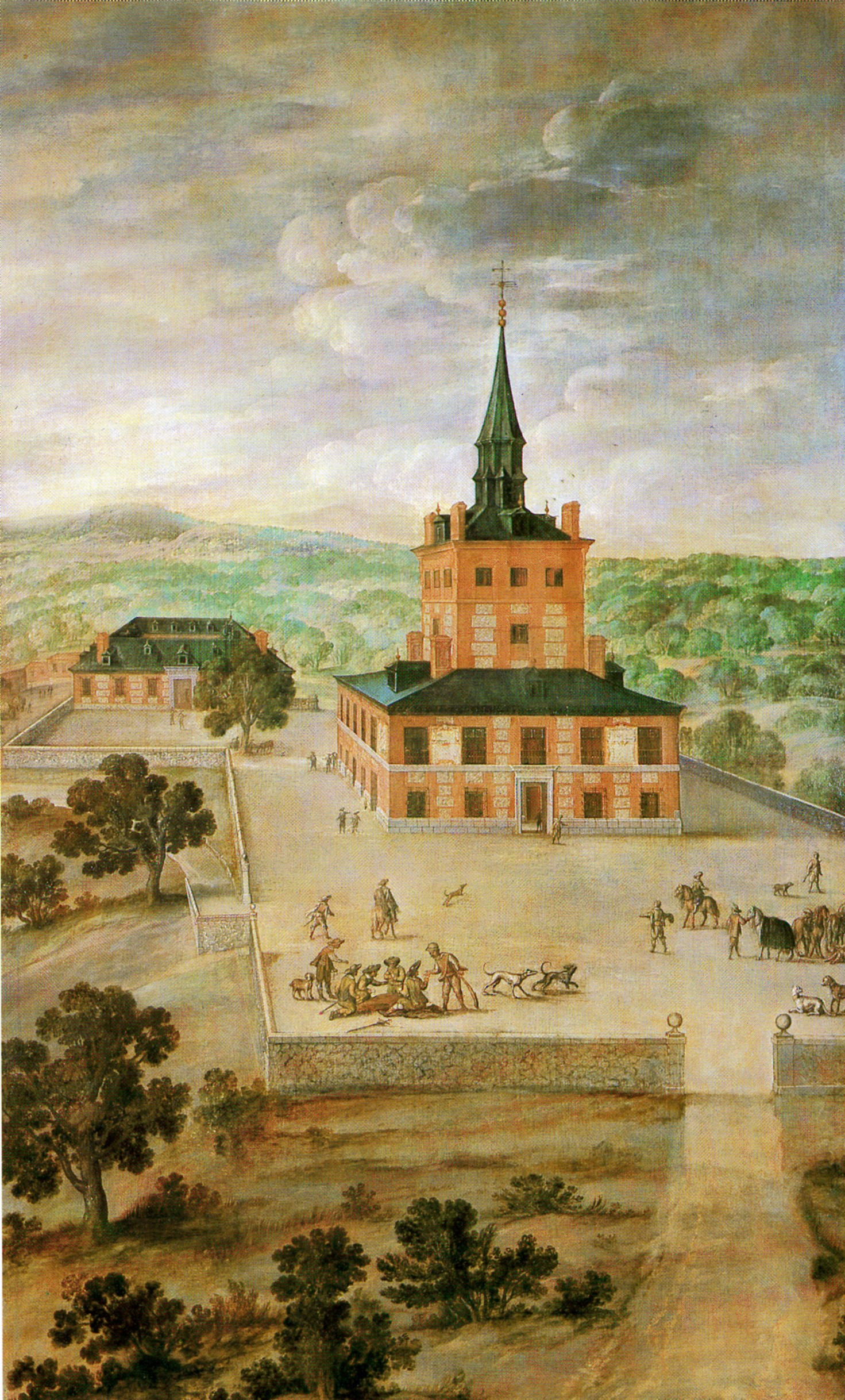 detail